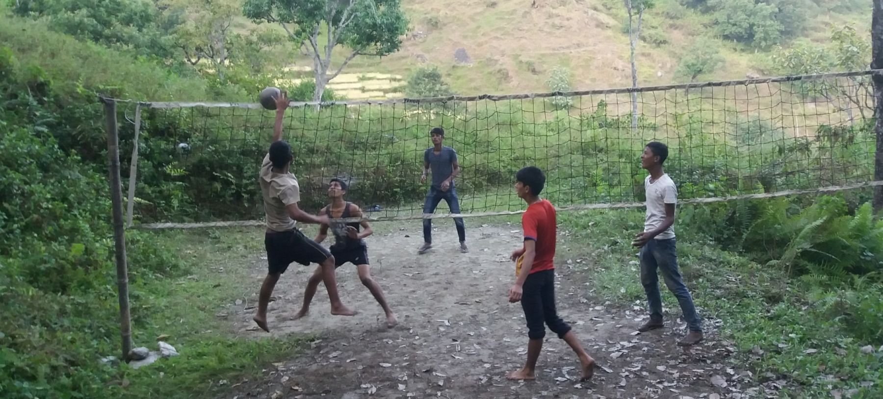 नेपाली: नेपालको एक पहाडी क्षेत्रमा भलिबल खेल्दै युवाहरू